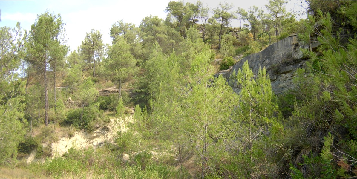 La Pedrera de la Coma (Monistrol de Calders, Moianès)